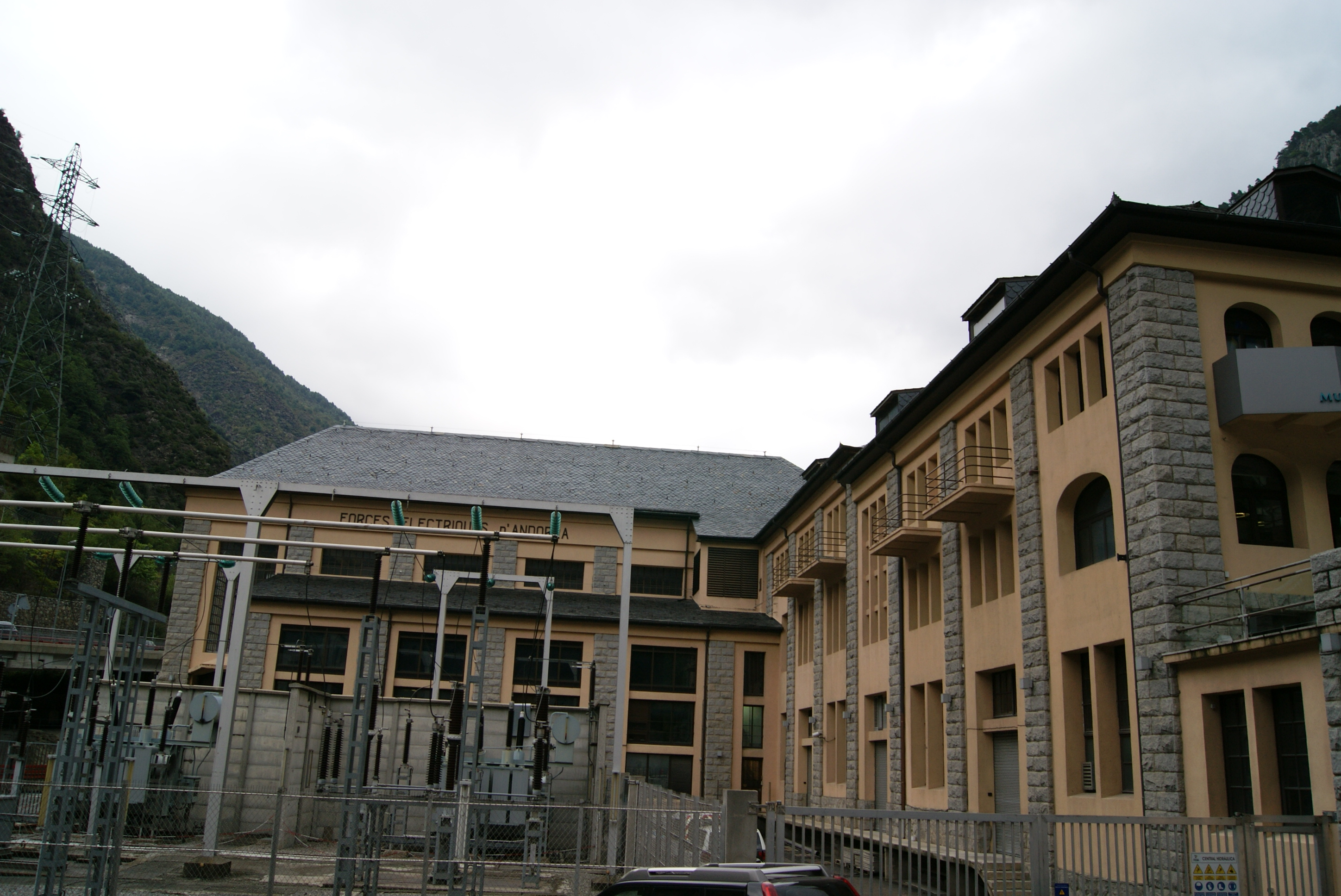 Central de FHASA (Encamp)